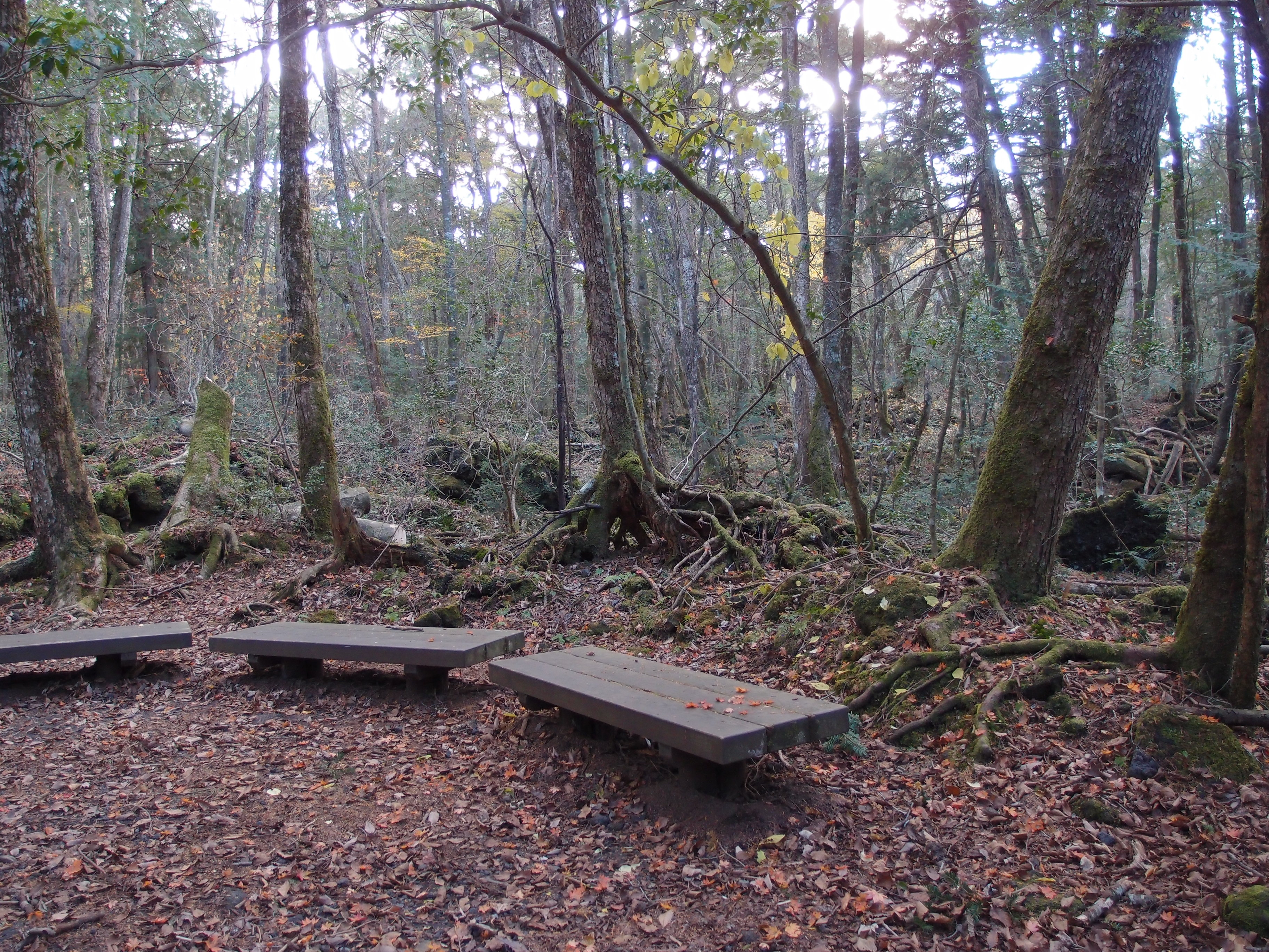 Aokigahara Forest